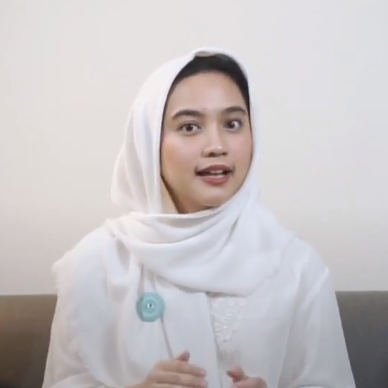 Rachel Amanda pada tahun 2018. Photo adalah hasil tangkapan layar dari video yang diunggah oleh Quran Indonesia Project dengan judul "Rachel Amanda - Bekerja Keras" yang dilisensikan Lisensi Atribusi Creative Commons (boleh digunakan kembali).